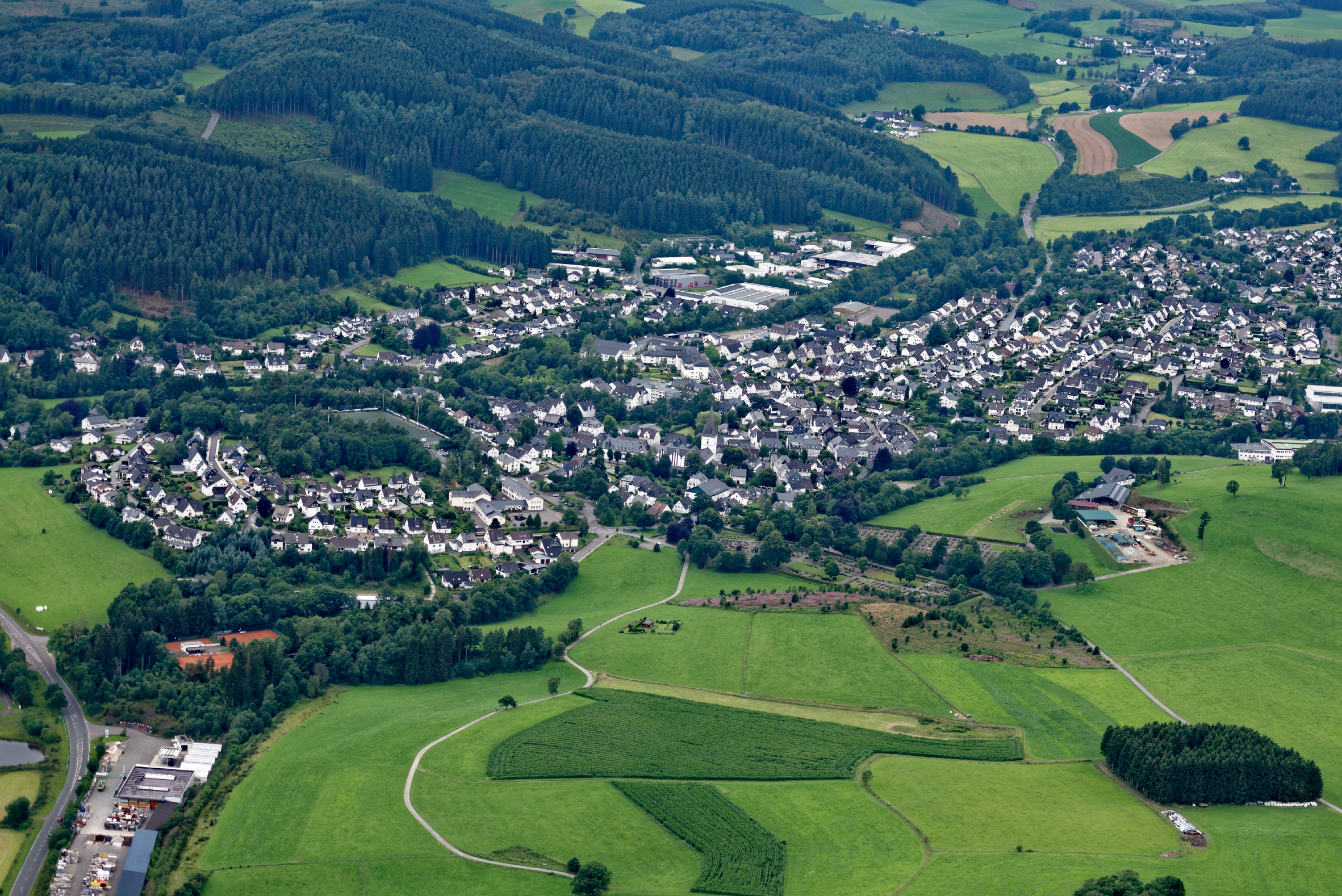 Fotoflug Sauerland West. Luftaufnahme: Übersicht über die Drolshagener Kernstadt; B 55, Nordrhein-Westfalen.